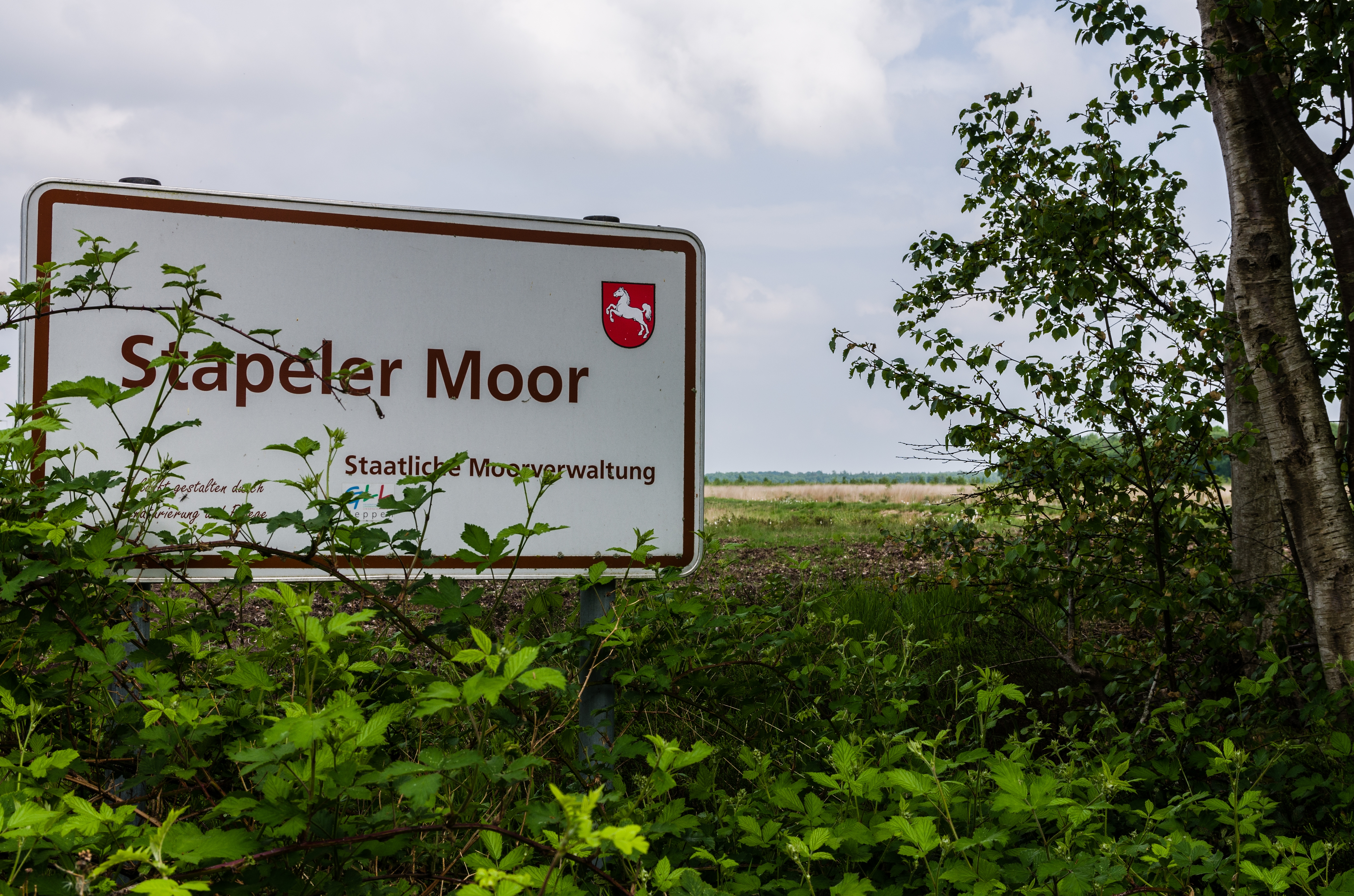 Schild der Staatlichen Moorverwaltung im Stapeler Moor – Das 536 ha große Naturschutzgebiet „Stapeler Moor“ (NSG WE 143) ist der südlichste Überrest der ehemals schier endlosen ostfriesischen Zentralmoore. Nach der 1997 erfolgten Beendigung des genehmigten Torfabbaus wurde inzwischen die Renaturierung des Gebietes eingeleitet. Hierzu werden mit Hilfe von Raupen und Baggern Polder geschaffen, zwischen deren Dämmen aus Schwarztorf sich das Niederschlagswasser sammelt. An den älteren Poldern ist bereits zu erkennen, dass das Naturschutzgebiet hochmoortypischen Tier- und Pflanzenarten zunehmend Rückzugs- und Lebensraum bietet. Das NSG ist Teil des FFH-Gebietes 010 „Lengener Meer, Stapeler Moor und Basenmeers-Moor“. Im Norden grenzt das NSG WE 101 „Lengener Meer“, im Osten das NSG 176 „Spolsener Moor“ sowie im Süden das NSG 254 „Stapeler Moor Süd und Kleines Bullenmeer“ an. (Infoquelle: NLWKN)